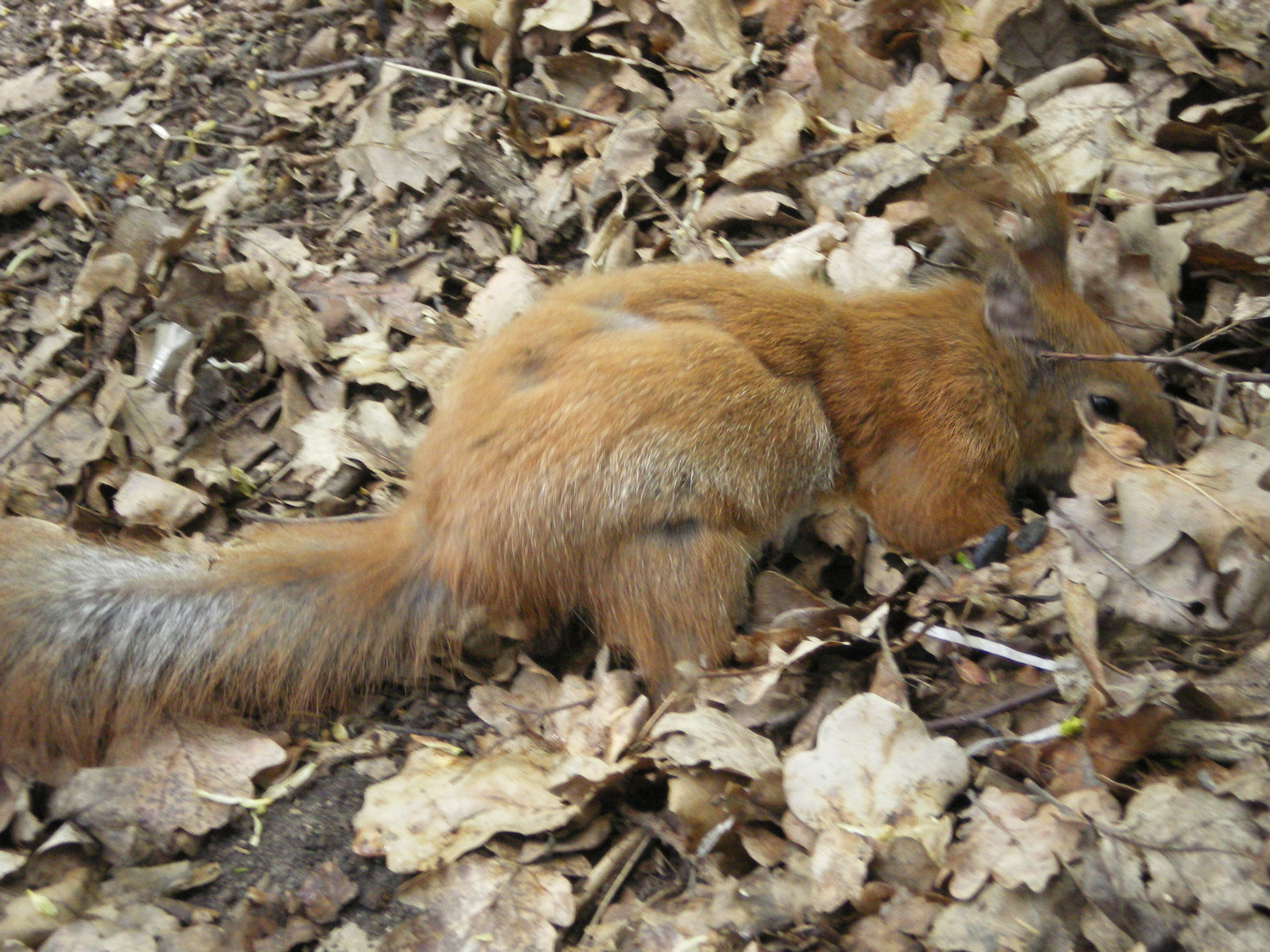 Белка обыкновенная (векша) в дубовых листьях. Защитная окраска векши позволяет ей слиться с опавшей дубовой листвой. Харьковский Лесопарк, 9 мая 2007.